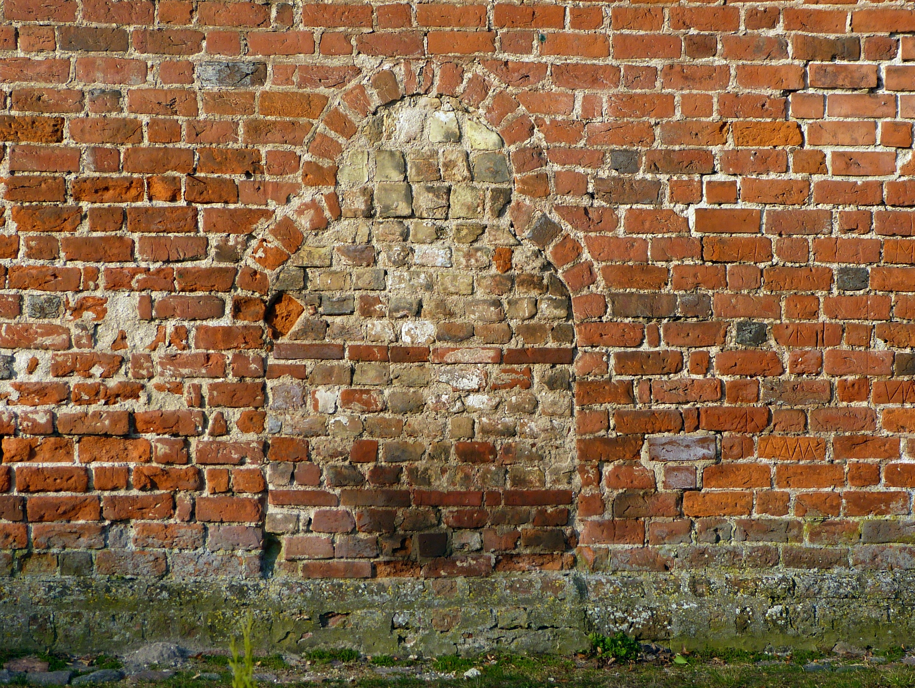 Kirche in Gramzow, Gemeinde Krusenfelde, zugemauertes Südportal mit Kleeblattschluss